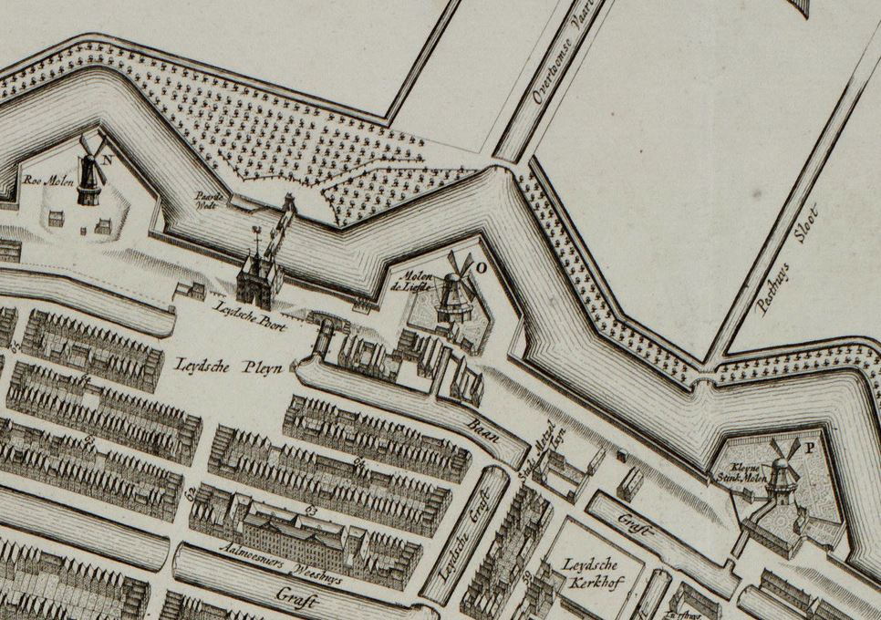 Detail van de kaart van Amsterdam van Gerrit de Broen uit 1737, met daarop het Leidseplein en enkele stellingmolens